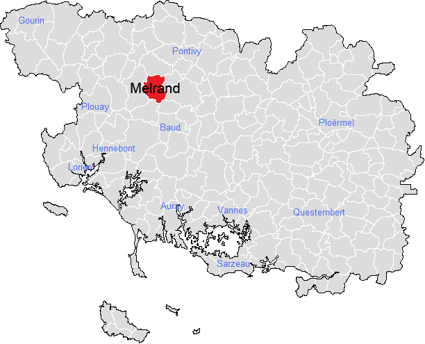 Localisation de Melrand dans le département du Morbihan.